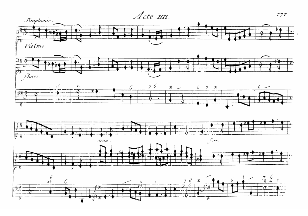 La Symphonie du Sommeil à l'acte IV de l'opéra Alcyone (1706), de Marin Marais.